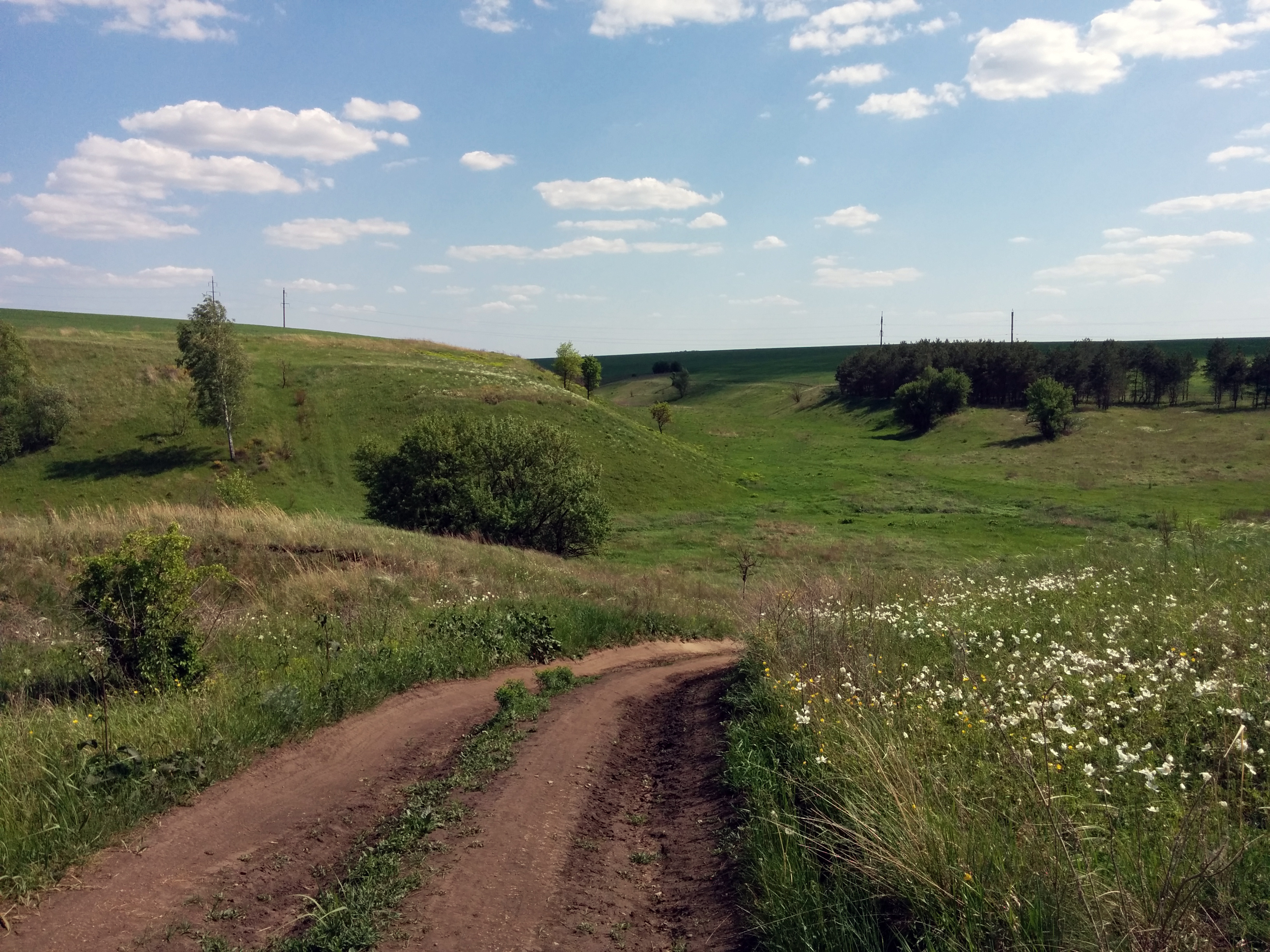 Балка "Непрец", Орловский район This image is related to the protected area of Russia number 5710103